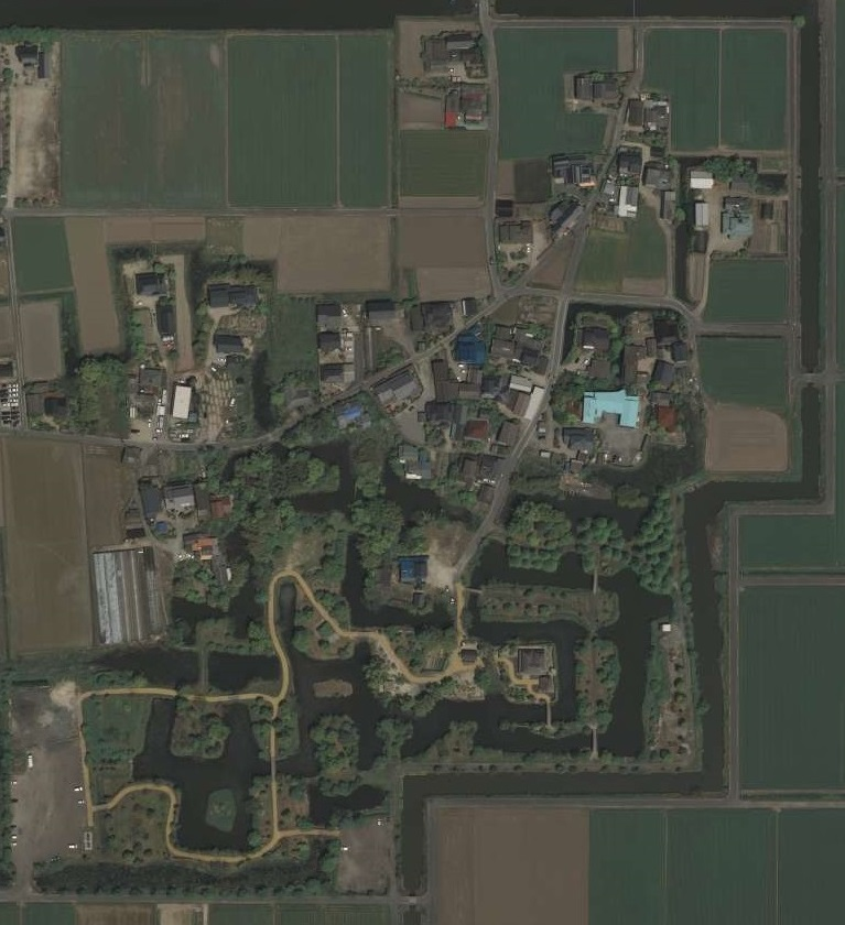 佐賀県神崎市横武クリーク公園